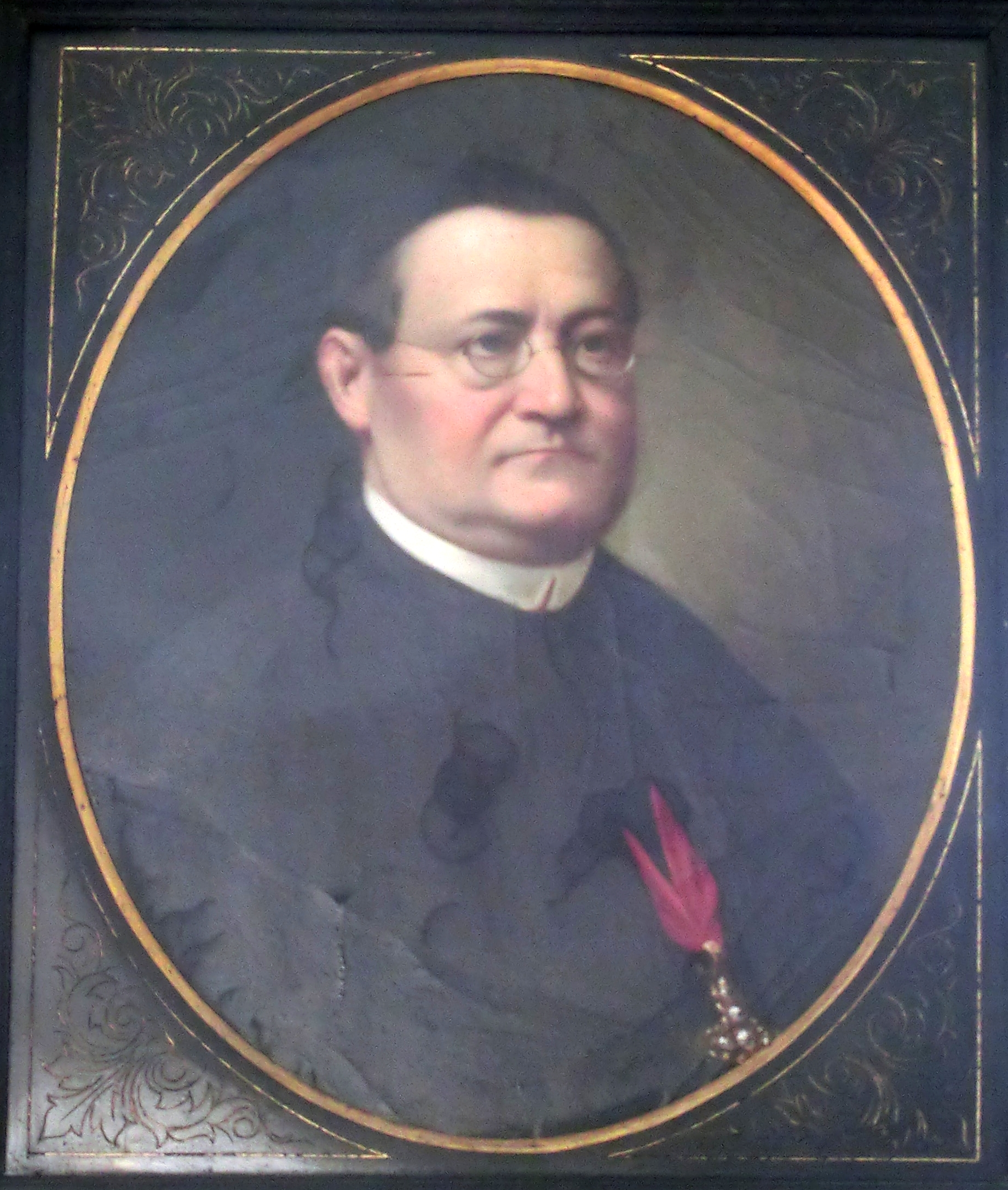 Hornopolický arciděkan Josef Maria Liebich.